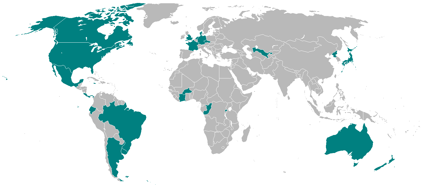 Selecciones clasificadas para disputar la Copa Mundial de Fútbol Sub-17 de 2011 en México.